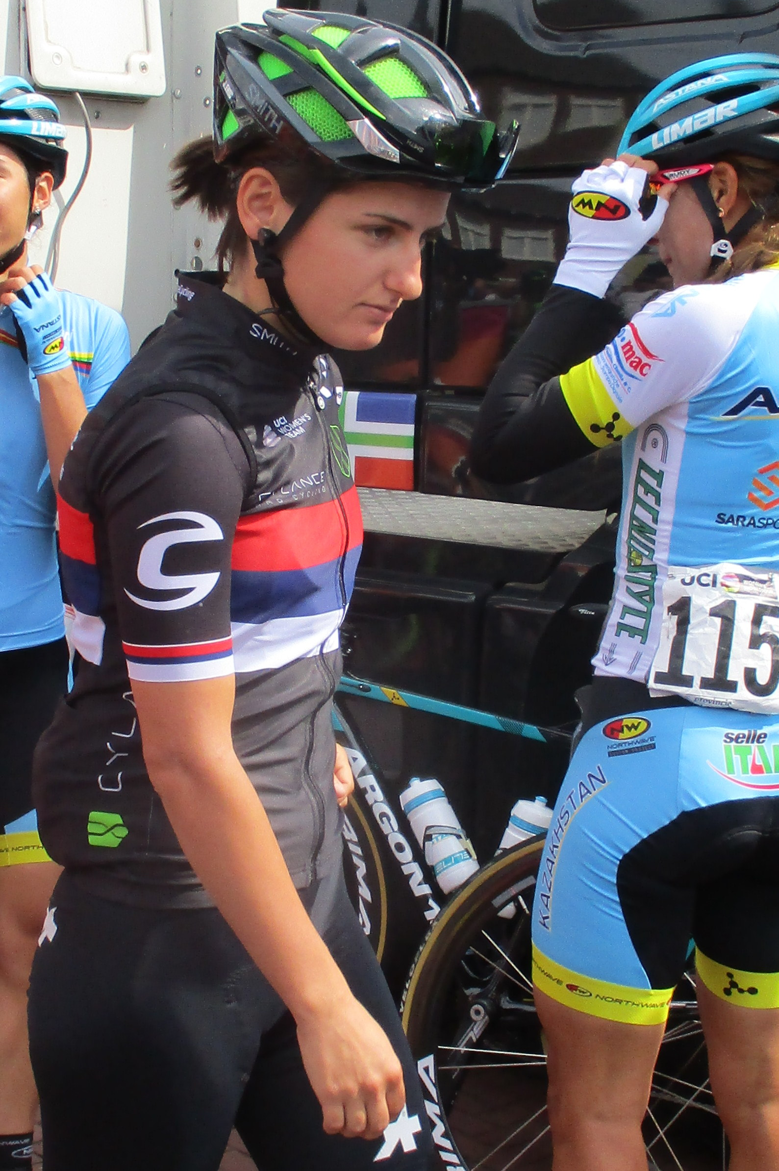 4e etappe van de Boels Ladies Tour 2018 door Noord-Limburg, start in Stramproy.